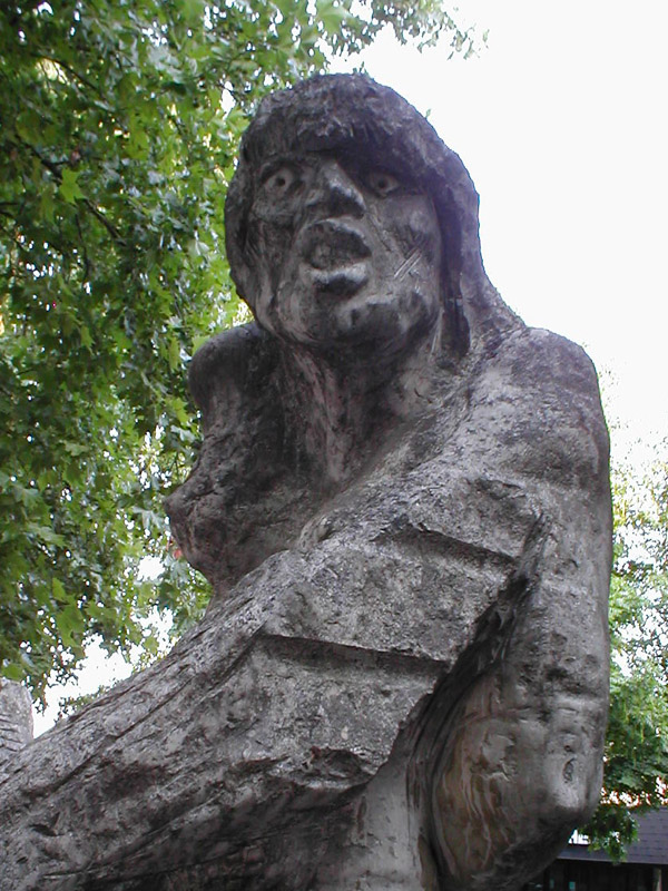 Detail der Skulptur "Schwarze Hofmännin" von Dieter E. Klumpp in Heilbronn-Böckingen (enthüllt 1985)